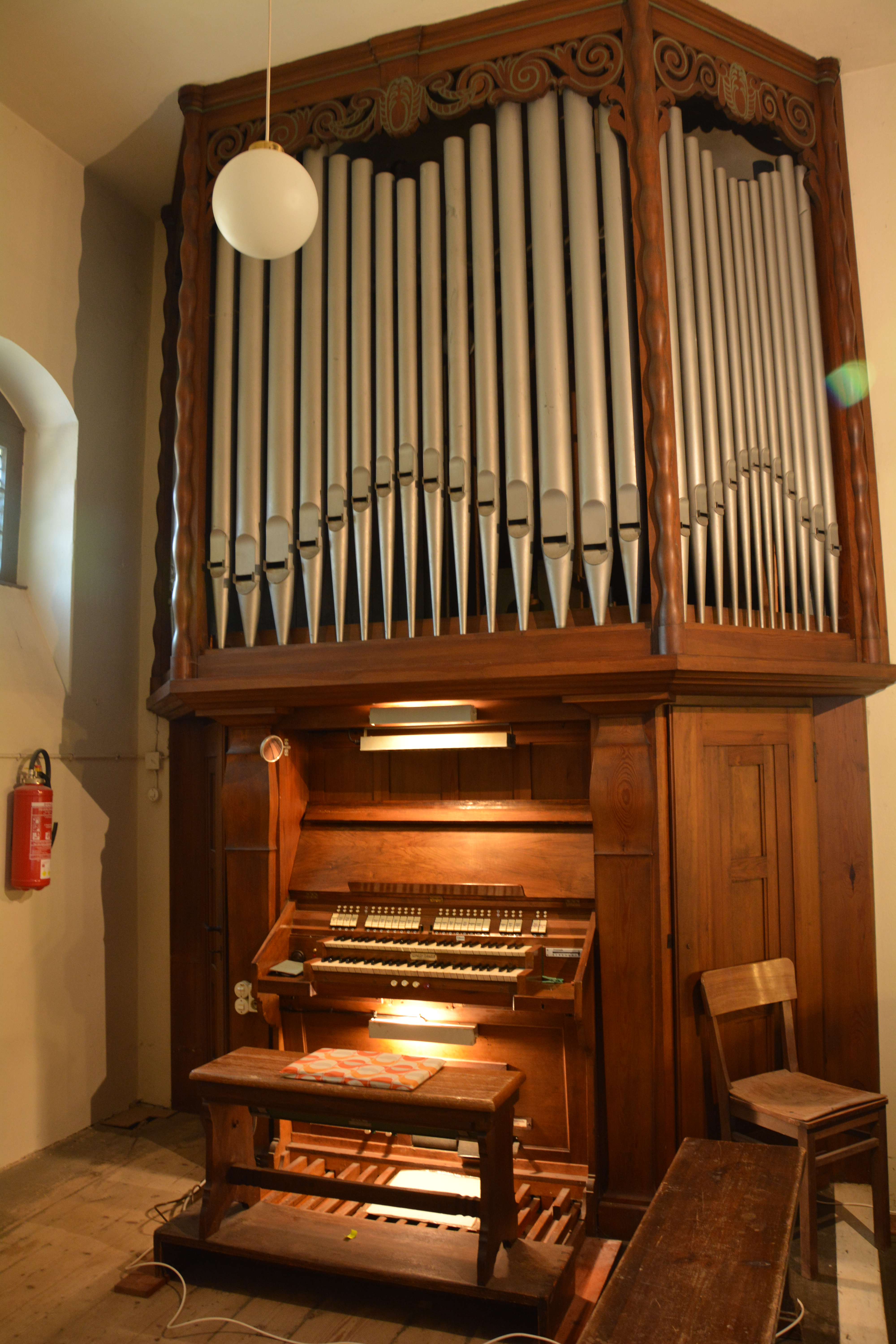 Bergkirche Kurort Kipsdorf, nach einen Entwurf von William Lossow und Max Hans Kühne 1908 erbaut. Jehmlichorgel